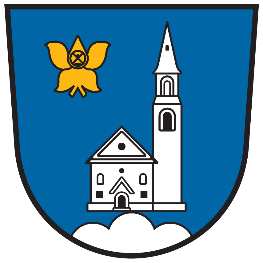 Wappen von Rangersdorf